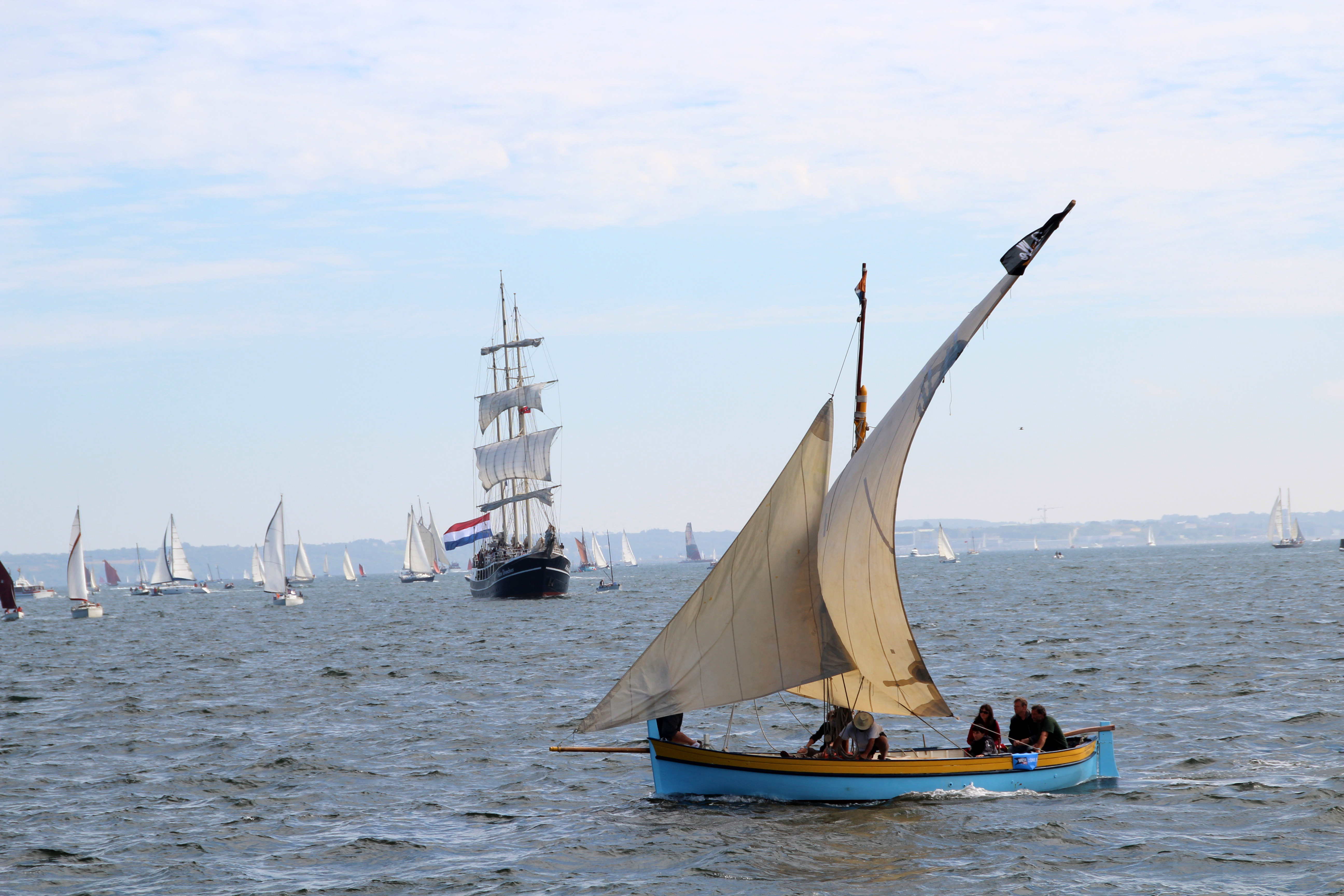 Tonnerres de Brest 2012-Catalina en rade abri